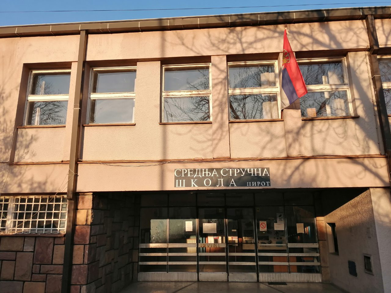 Srednja strucna skola iz Pirota